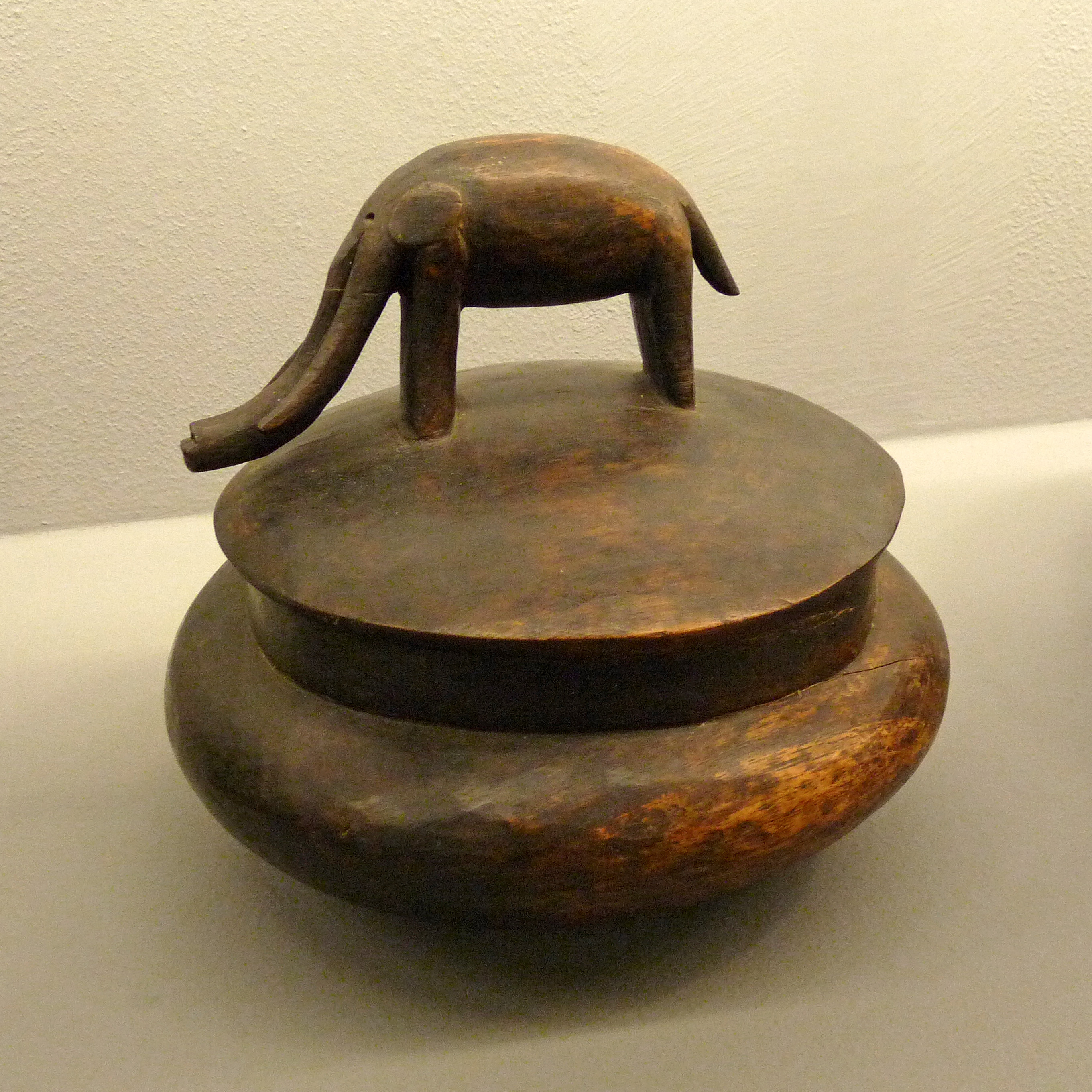 Plat à couvercle, population Lozi, Zambie, 19e siècle, bois. Musée du quai Branly.